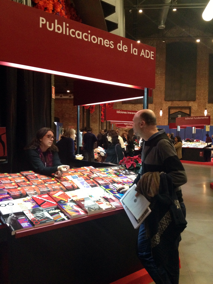 Feria del libro teatral en Madrid 6 de noviembre de 2015